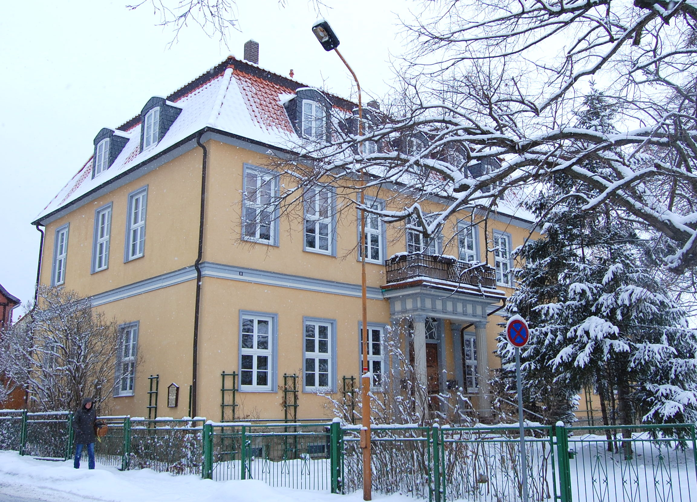 Harzburger Straße 31 in Ilsenburg, von Christian Friedrich Jasche (1780-1871) errichtetes Wohnhaus